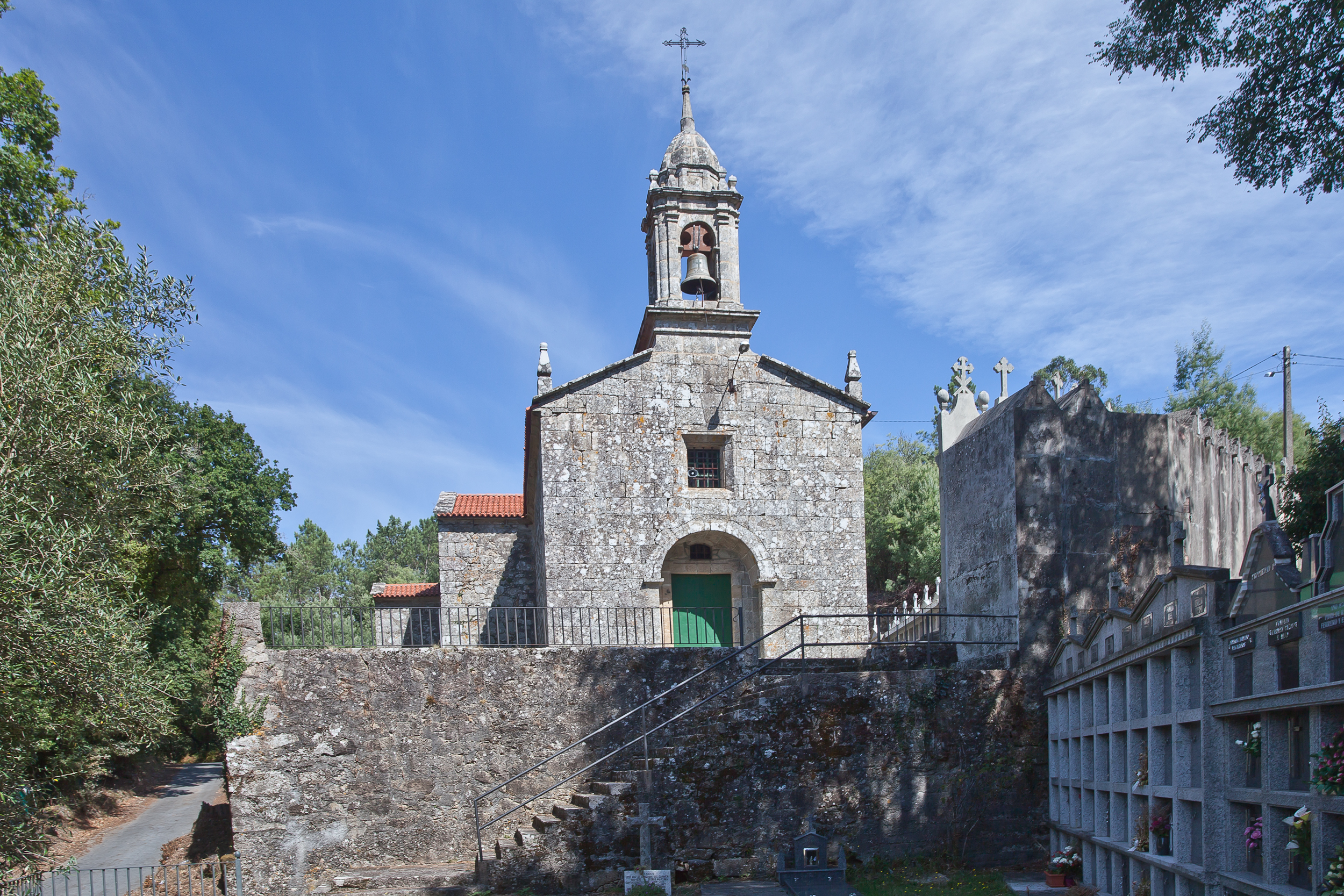 Igrexa parroquial de Couso, A Estrada, Galiza